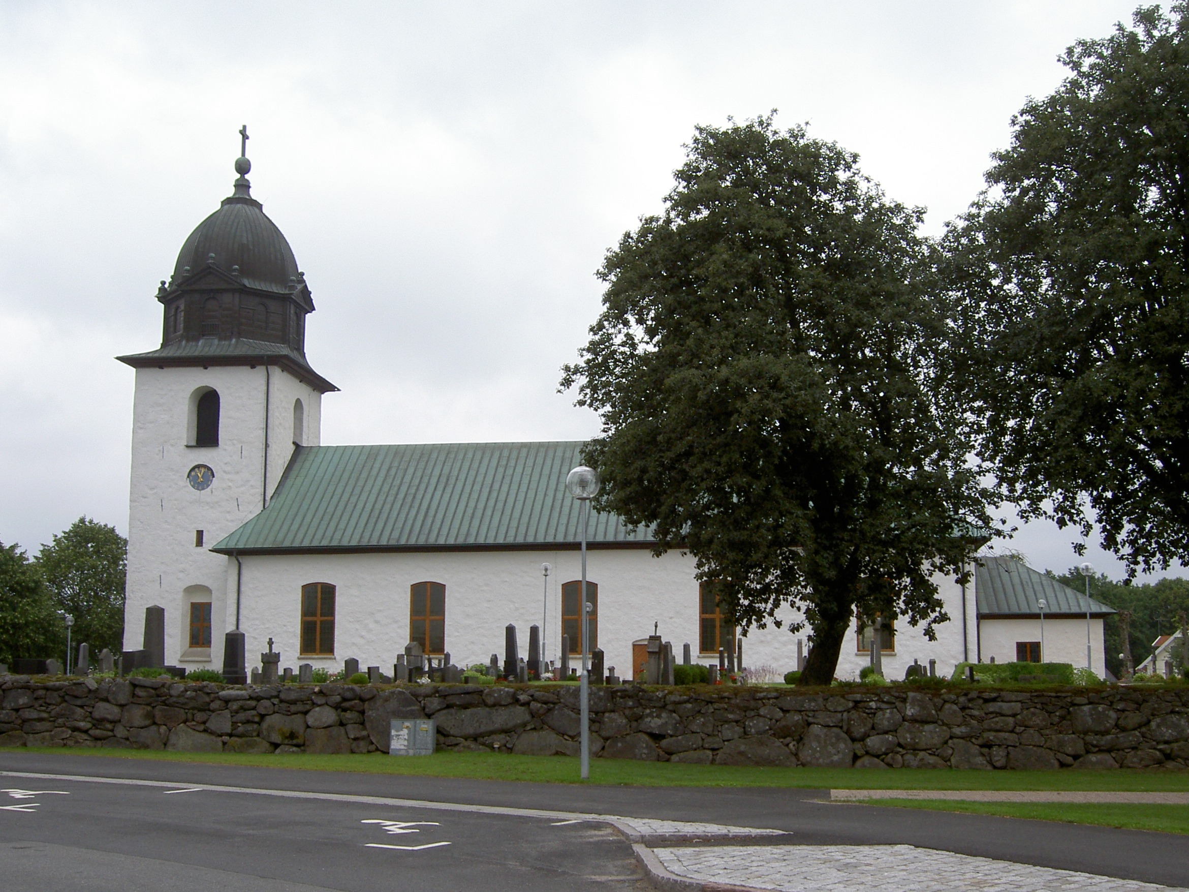 Örkeneds kyrka